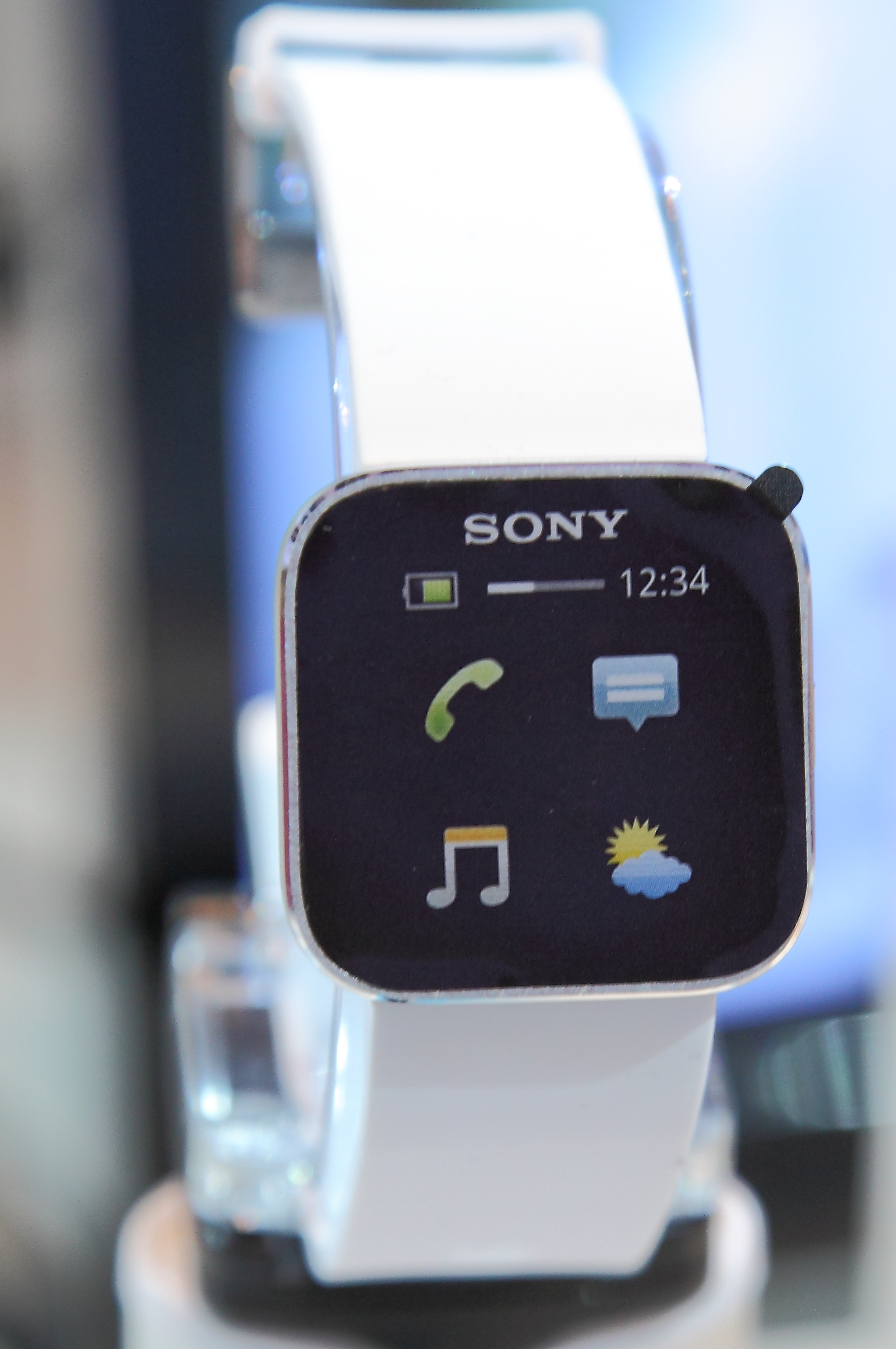 Sony; SmartWatch; MN2; Android 2.1 and later; multi-level touchscreen; bluetooth 3.0; OLED 1.3 display